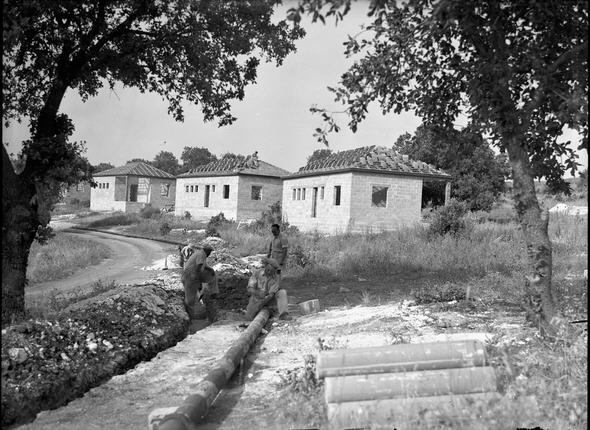 בית שערים הצפונית - הבתים הראשונים הולכים ונגמרים ומוכנים יהיו לקליטת עולים חדשים.